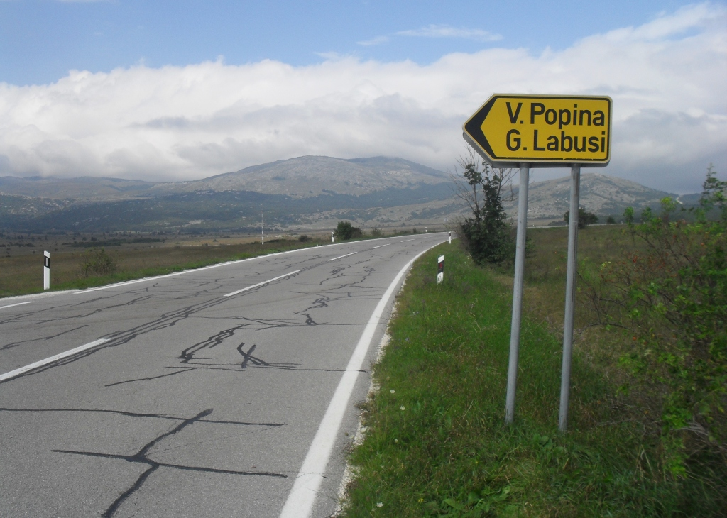 Скретање за Велику Попину из правца Грачаца, Лика.